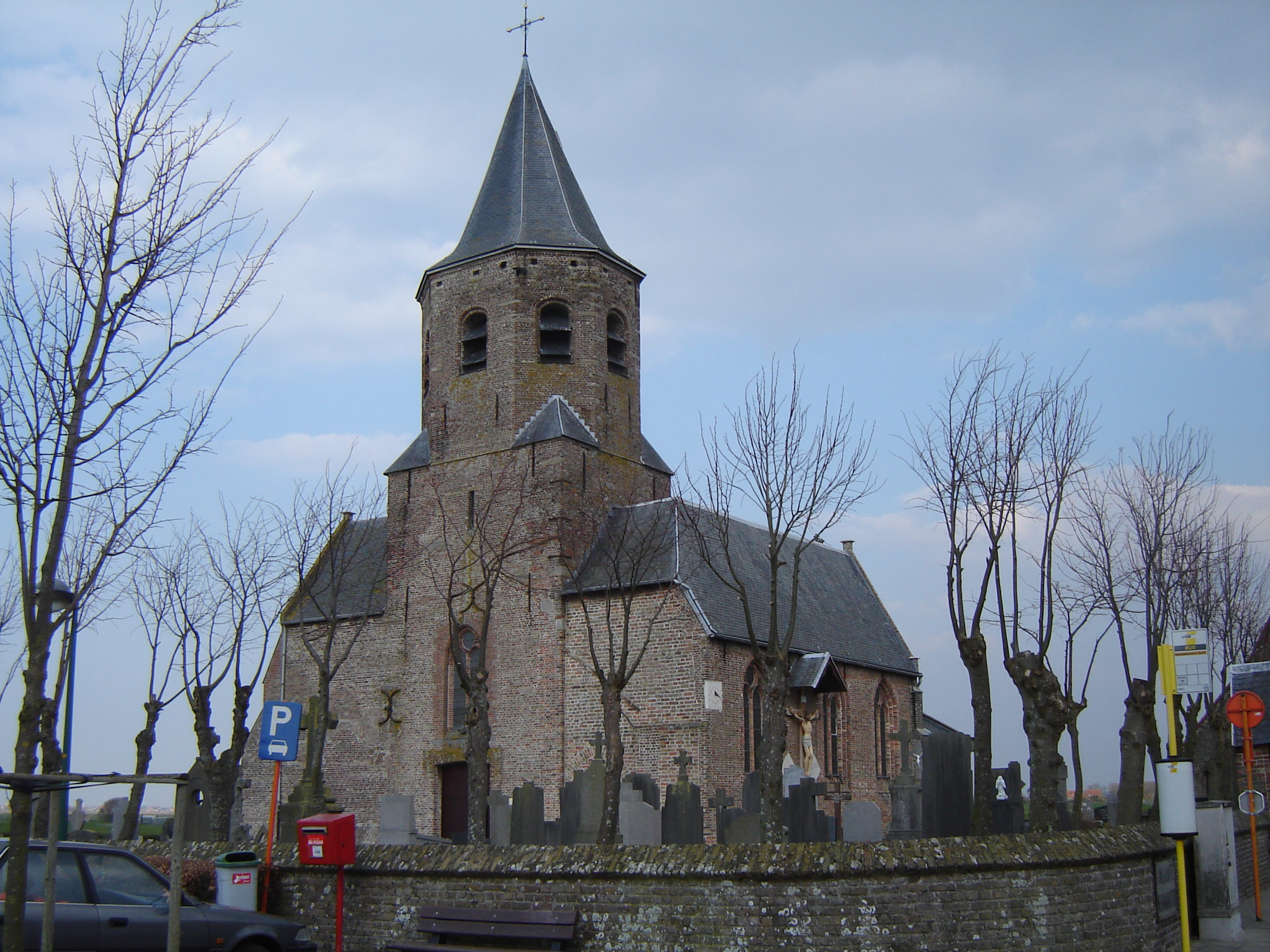 Sint-Bartholomeuskerk in NieuwmunsterChurch of Saint Bartholomew in Nieuwmunster, in Zuienkerke, West Flanders, Belgium